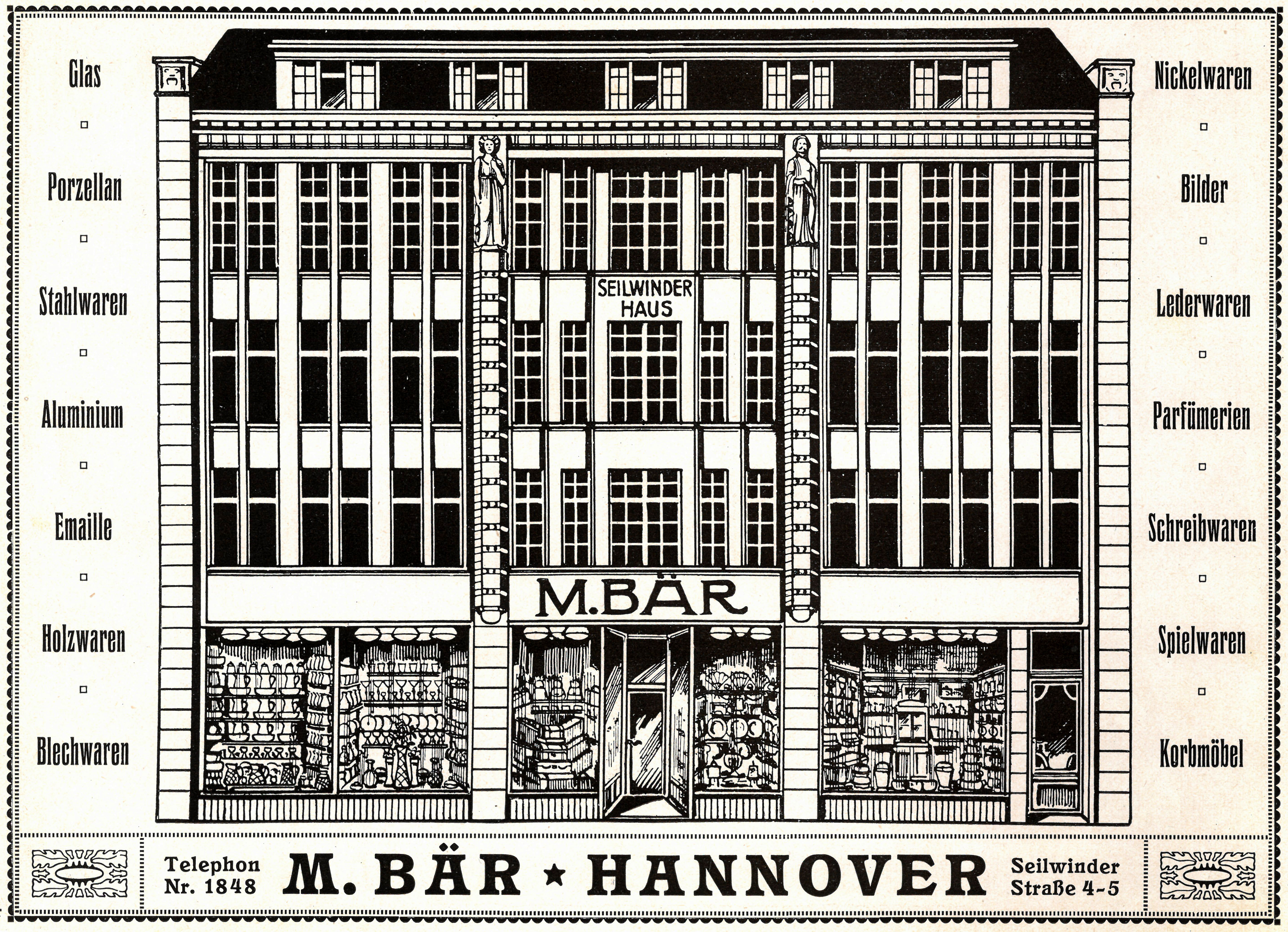 Ausschnitt aus der Seite 4 der DIN-A3-großen Druckschrift „Neu-Hannover. Festschrift des Hannoverschen Couriers zur Rathaus-Weihe 1913“ die die Tageszeitung Hannoverscher Courier anlässlich der Einweihung des Neuen Rathauses in Hannover herausgab. Das Blatt ohne Künstlersignatur zeigt unten eine Zeichnung mit umlaufenden Schmuckrahmen von dem „Seilwinderhaus M. Bär“ in der Seilwinderstraße 4-5, in dem Glas, Porzellan, Stahlwaren, Aluminium, Emaille, Holzwaren, Blechwaren, Nickelwaren, Bilder, Lederwaren, Parfümerien, Schreibwaren, Spielwaren und Korbmöbel angeboten wurden ...